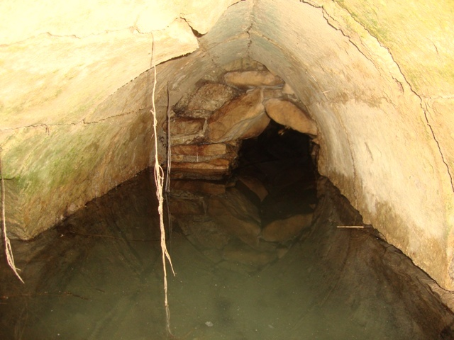 Font de Castellitx de la Pau, a Algaida, Mallorca